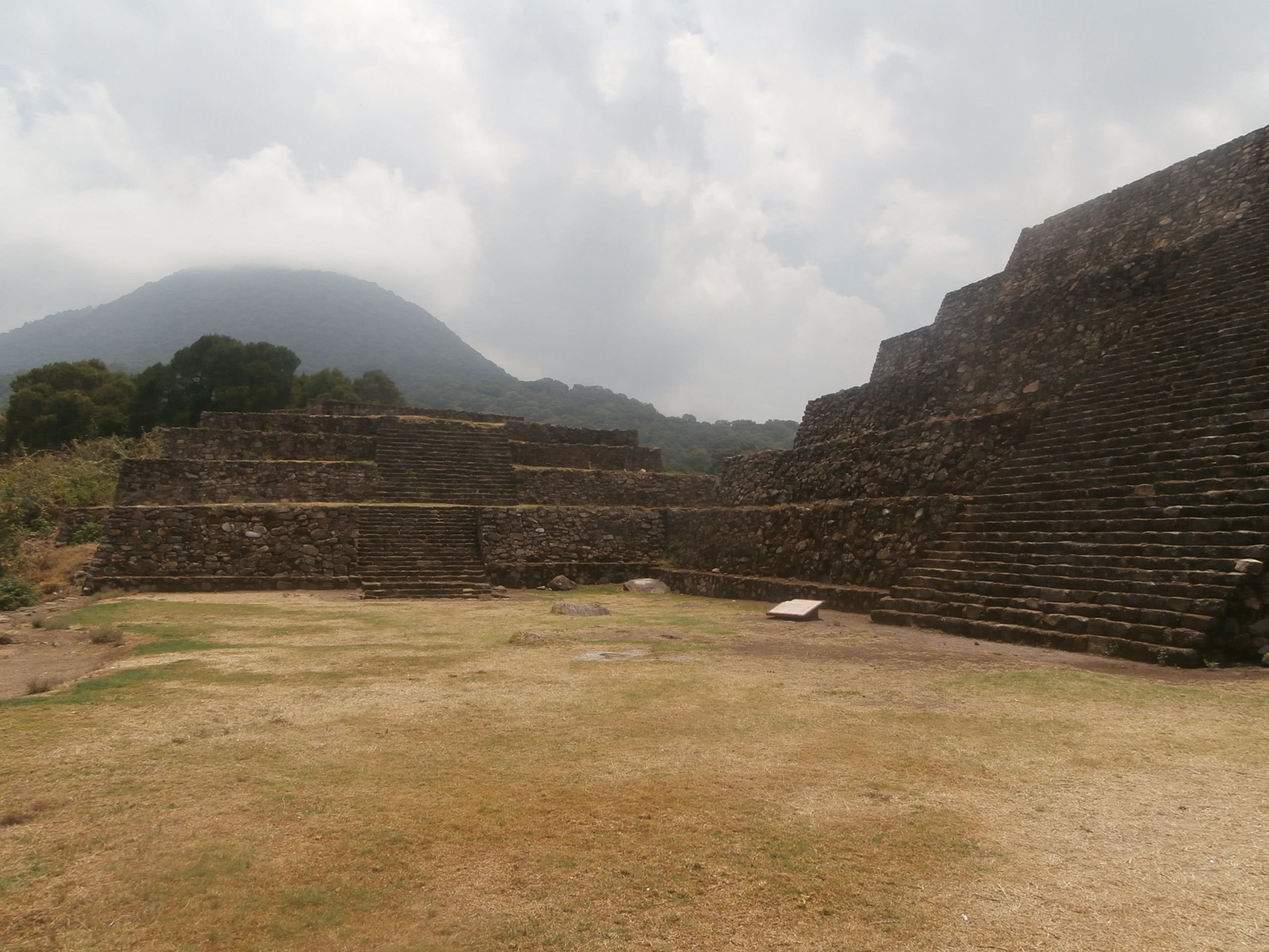 Zona arqueológica de San Felipe-Ziráhuato